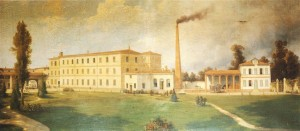 Dipinto di Luigi Ashton commissionato da Ercole Lualdi e raffigurante il Cotonificio Ercole Lualdi di Brescia.